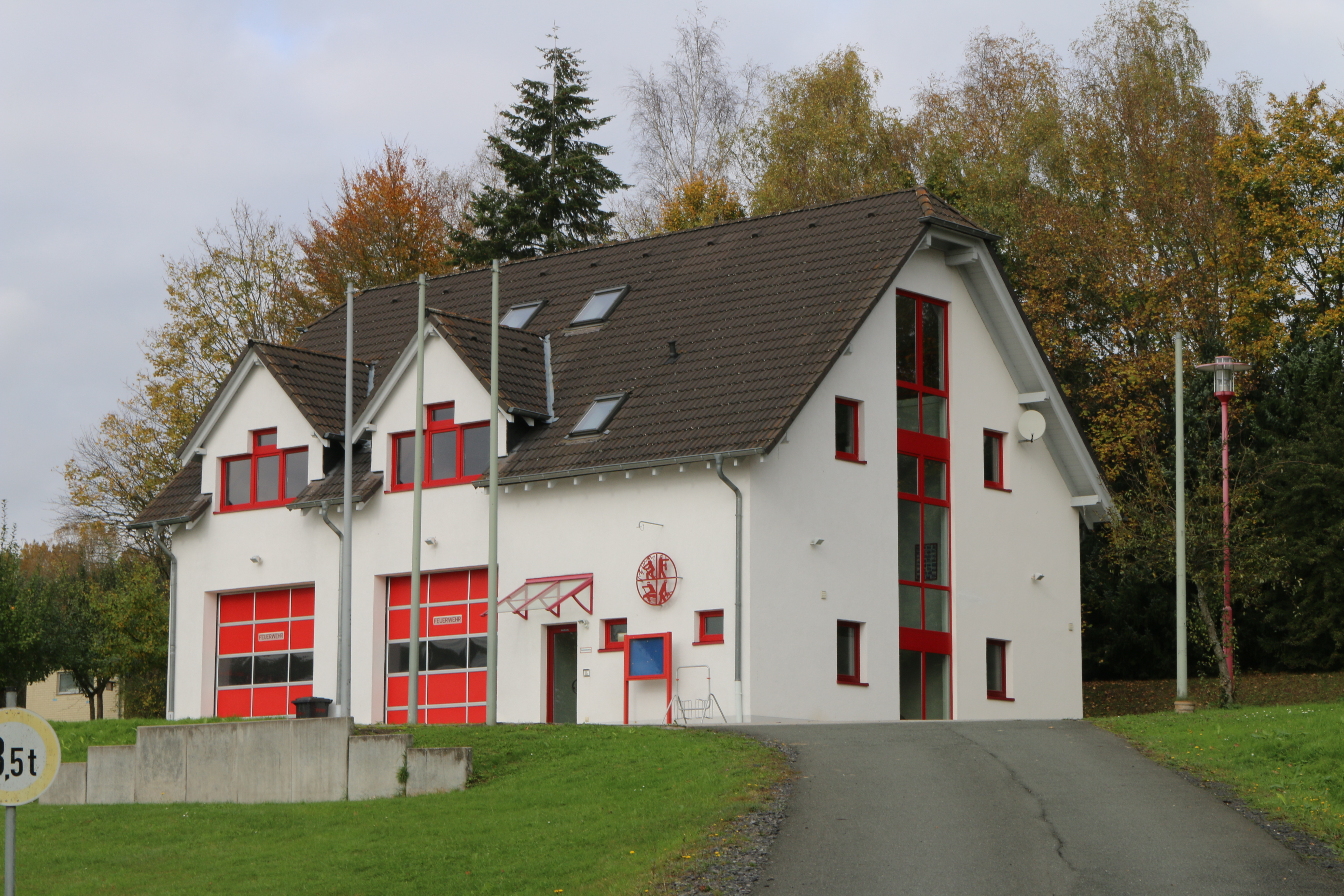 Lahr, Westerwald: Das Gebäude der Freiwilligen Feuerwehr